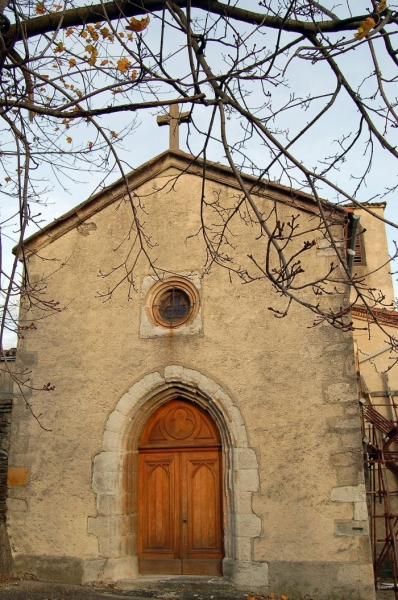 Église de Dargoire (Loire, France), du XVIe siècle.